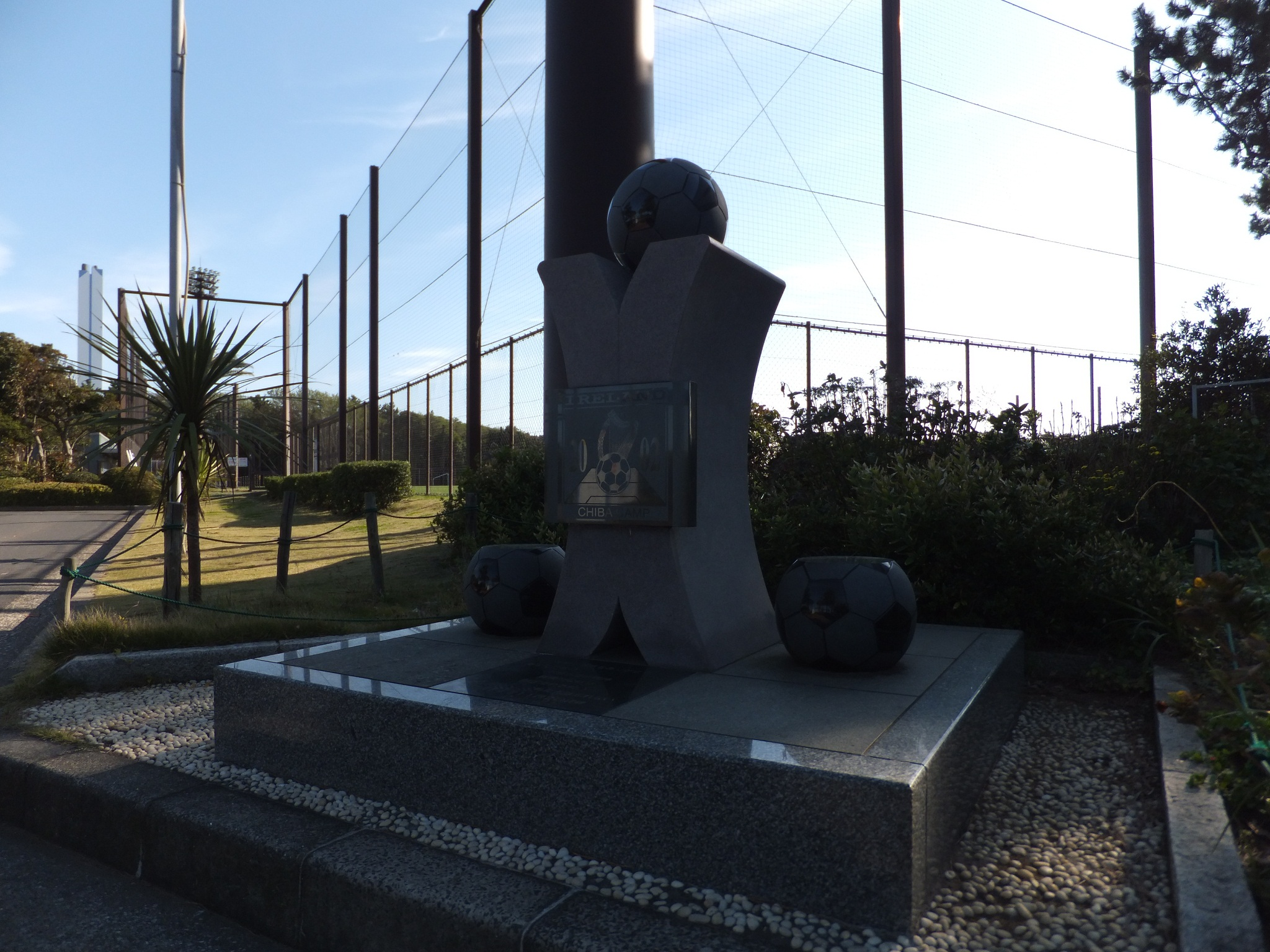 稲毛海浜公園球技場前、アイルランド代表の来日を記念した石碑です。